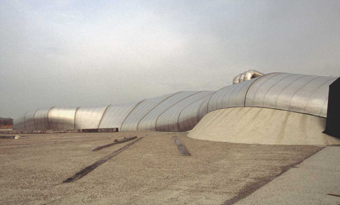 zijaanzicht/side-view